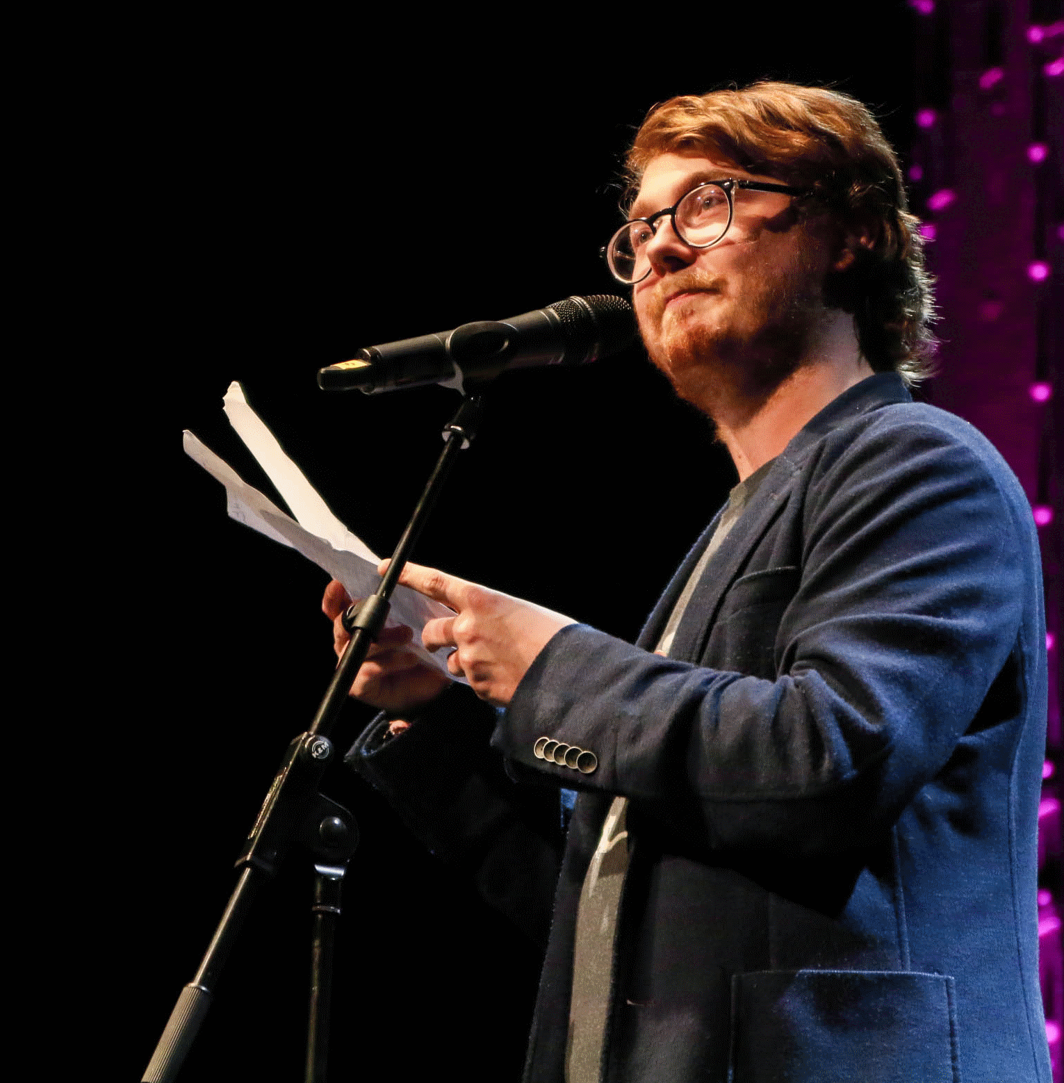 Johannes Floehr im April 2016 in der Essener Weststadthalle